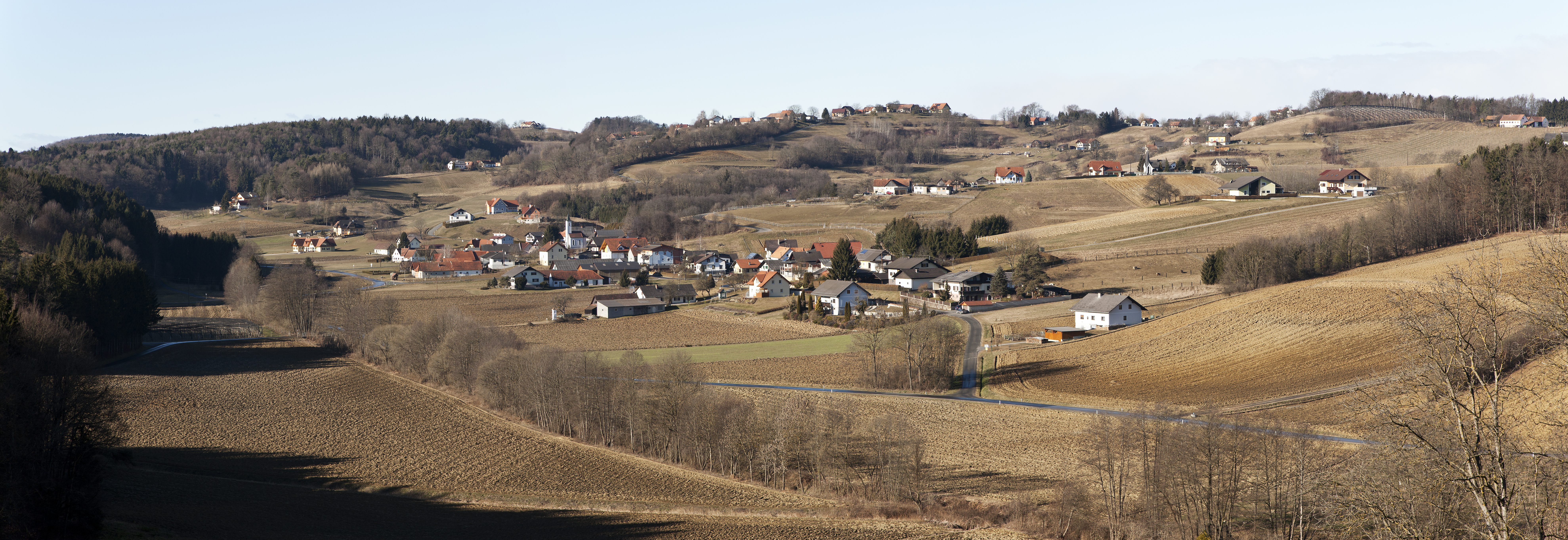 Schweinz ist eine der sechs Katastralgemeinden der Marktgemeinde Riegersburg, im Bezirk Feldbach, in Steiermark.